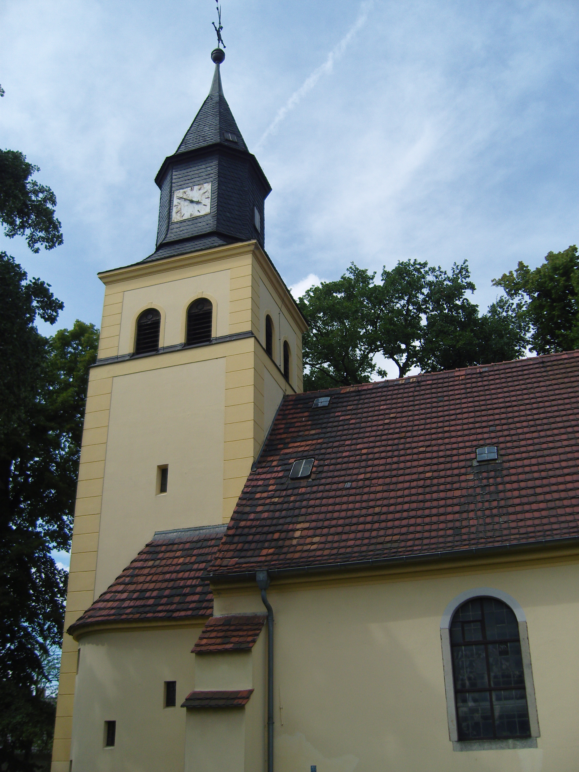 Dorfkirche in Wormlage einem Ortsteil von Großräschen; die Kirche ist ein Baudenkmal